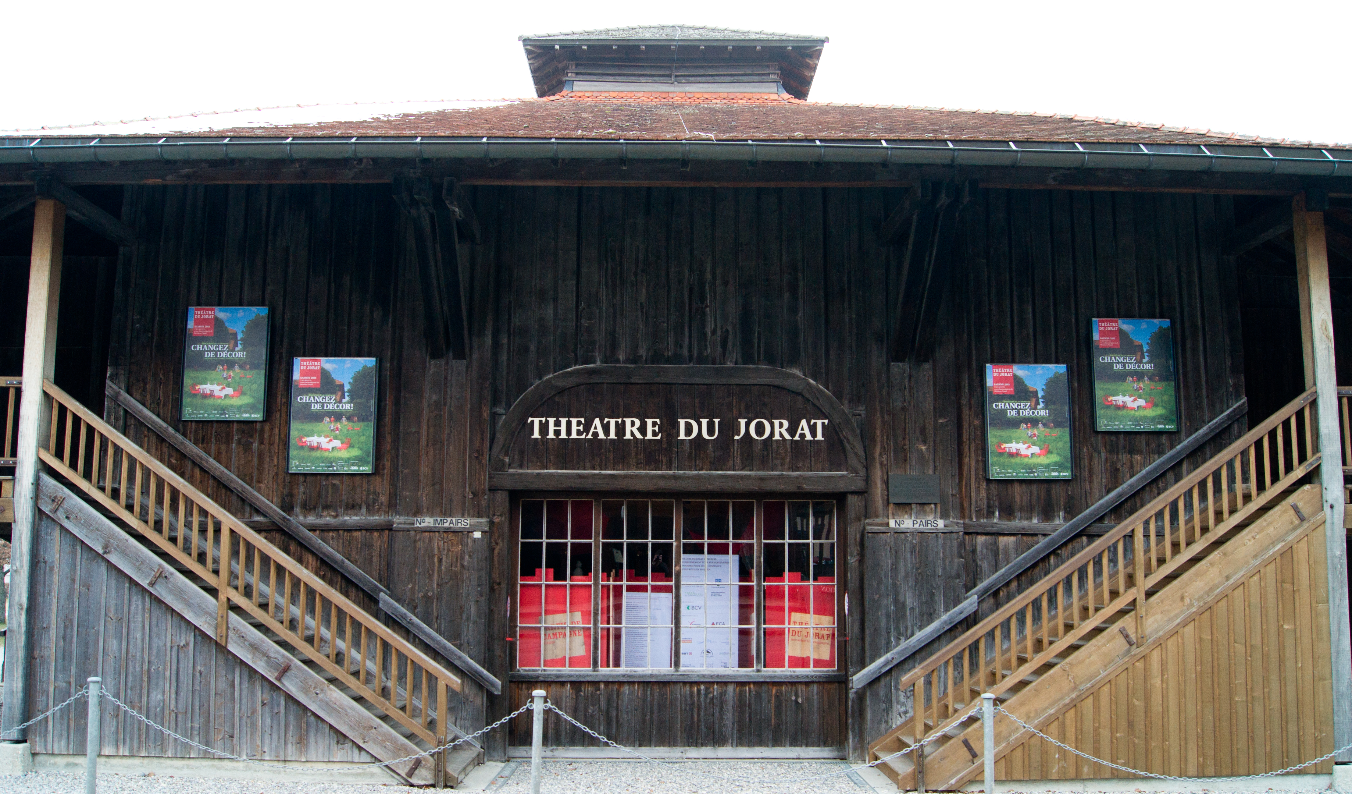 Thêatre du Jorat - Mézières.